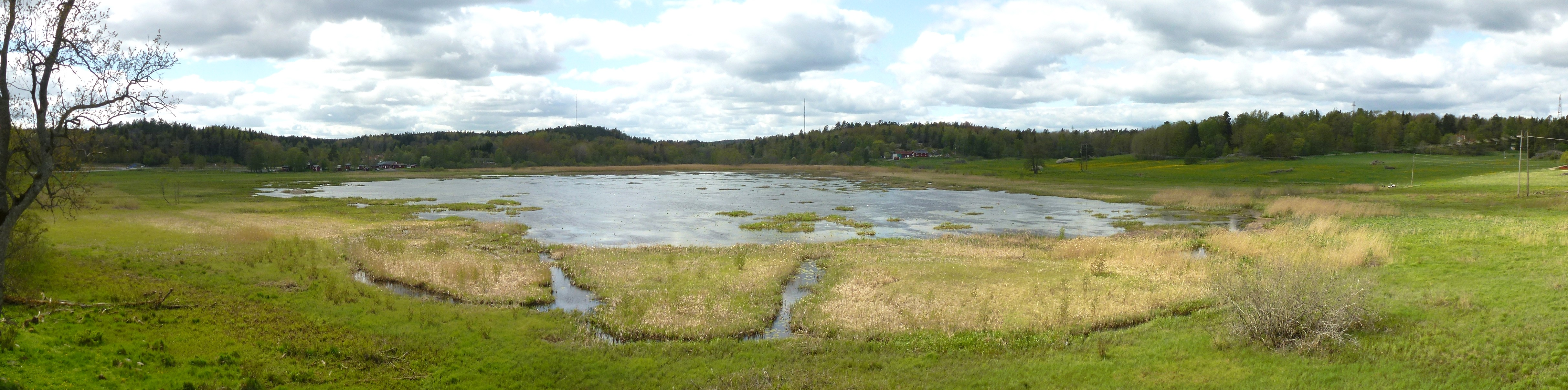 Lissmasjön panorama